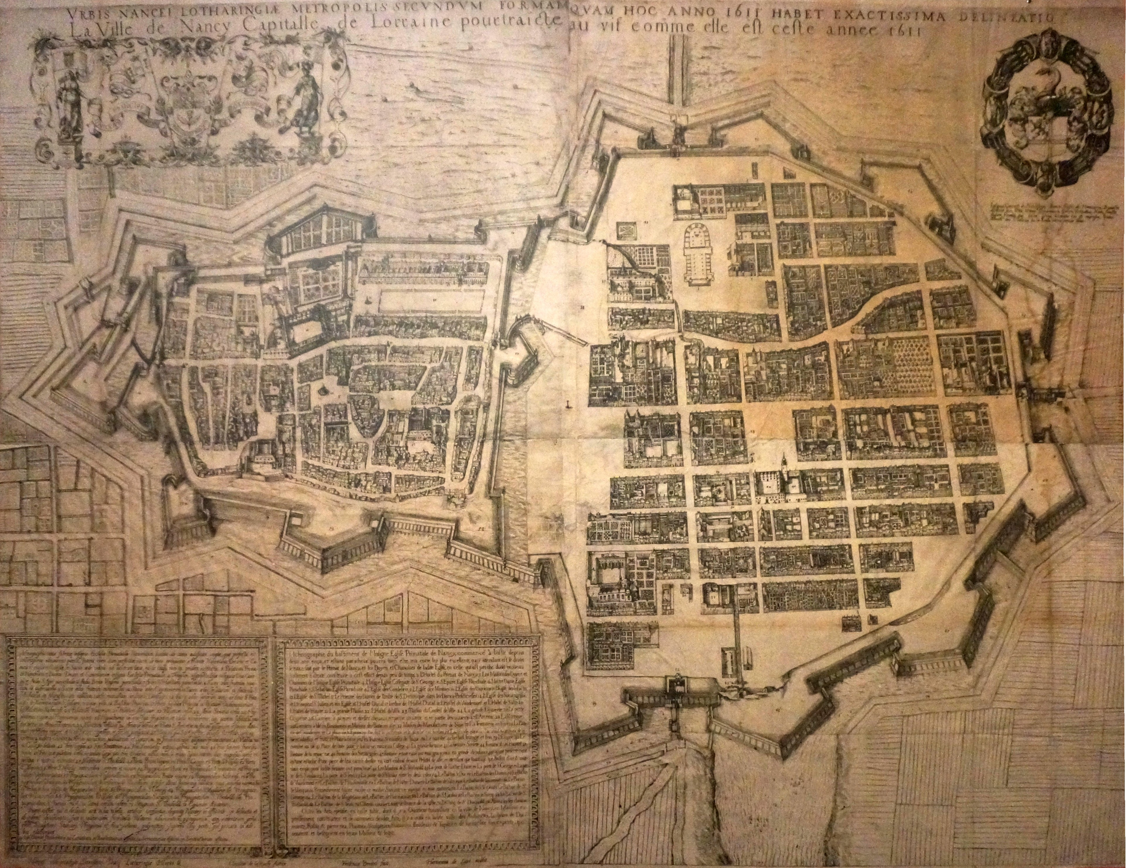 Présenté au Musée Lorrain. "La ville de Nancy, Capitale de Lorraine, pourtraicte au vif comme elle est ceste année 1611." Commandé par Claude de la Ruelle, Secrétaire du Duc Charles III de Lorraine, dessiné par Ferri Brentel, et gravé par Herman de Loye en 1611.